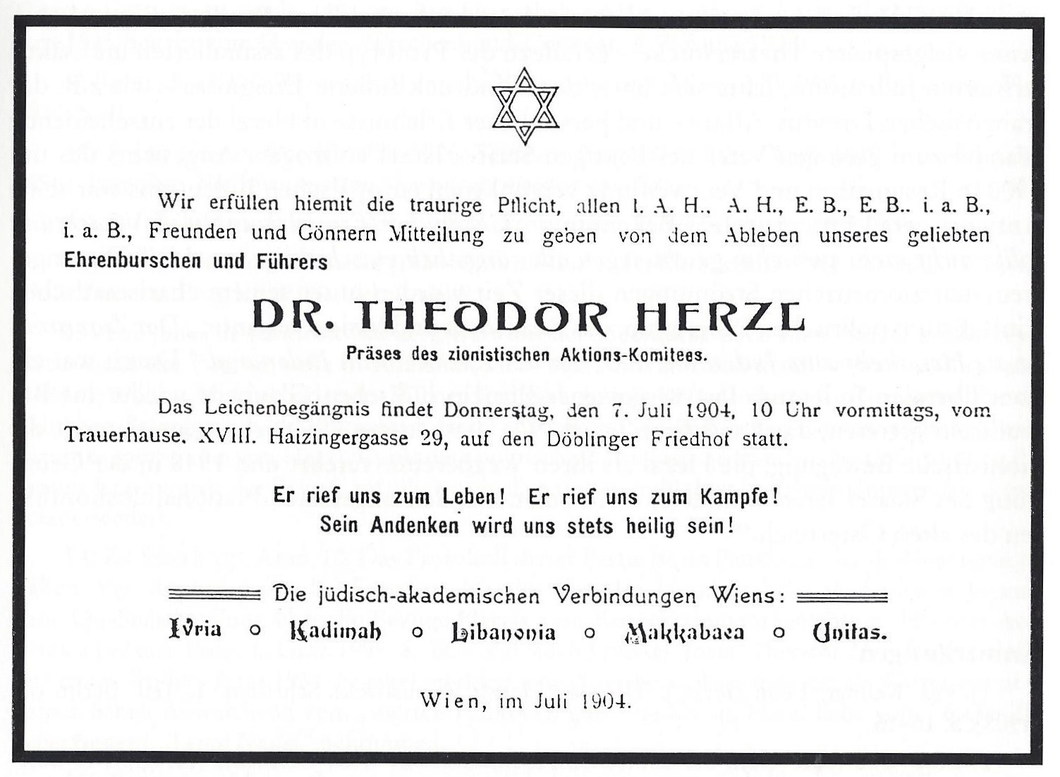 Theodor Herzls Todesanzeige der Wiener Studentenverbindungen Ivria, Kadimah, Libanonia, Makkabaea und Unitas.